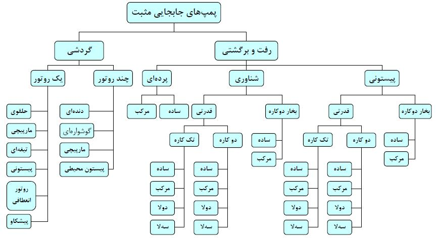 تقسيم بندی پمپ های جابجايی مثبت